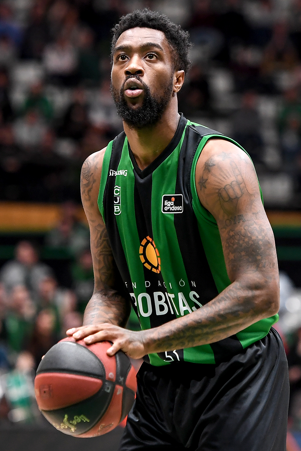 Tony Wroten en un partit de l'ACB 2019-20 amb el Club Joventut Badalona